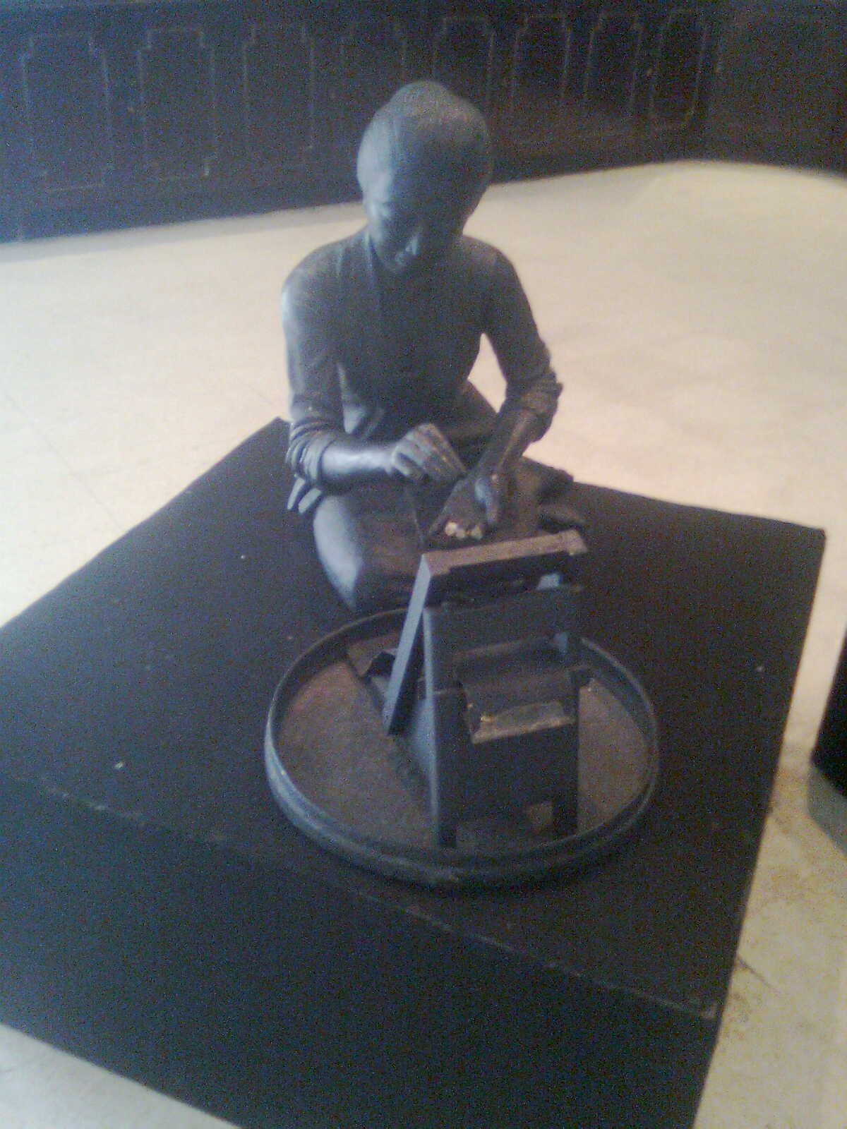 Proses Perajang Rokok